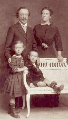 Давид Ландау с женой и детьми Соней и Левой. 1910 г.